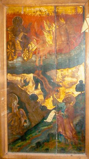 „Възнесение Илиево“, 49 Χ 90. Η ΑΝΑΛΗΨΙC ΤΟΥ ΠΡΟΦΗΤΟΥ ΗΛΙΟV· Ο ΠΡΟΦΗΤΗC ΤΡΕΦΟΜ[ΕΝΟC] / ὑπὸ κόρ[ακος] [Ο ΠΡΟΦΗΤΗC] ΕΛΙCCΑΙΟς. Δέησις τοῡ δούλου τοῡ θεοῡ : / ἵτζιου κρέτζωβαλή · / 1851 · / : θ : μ ·